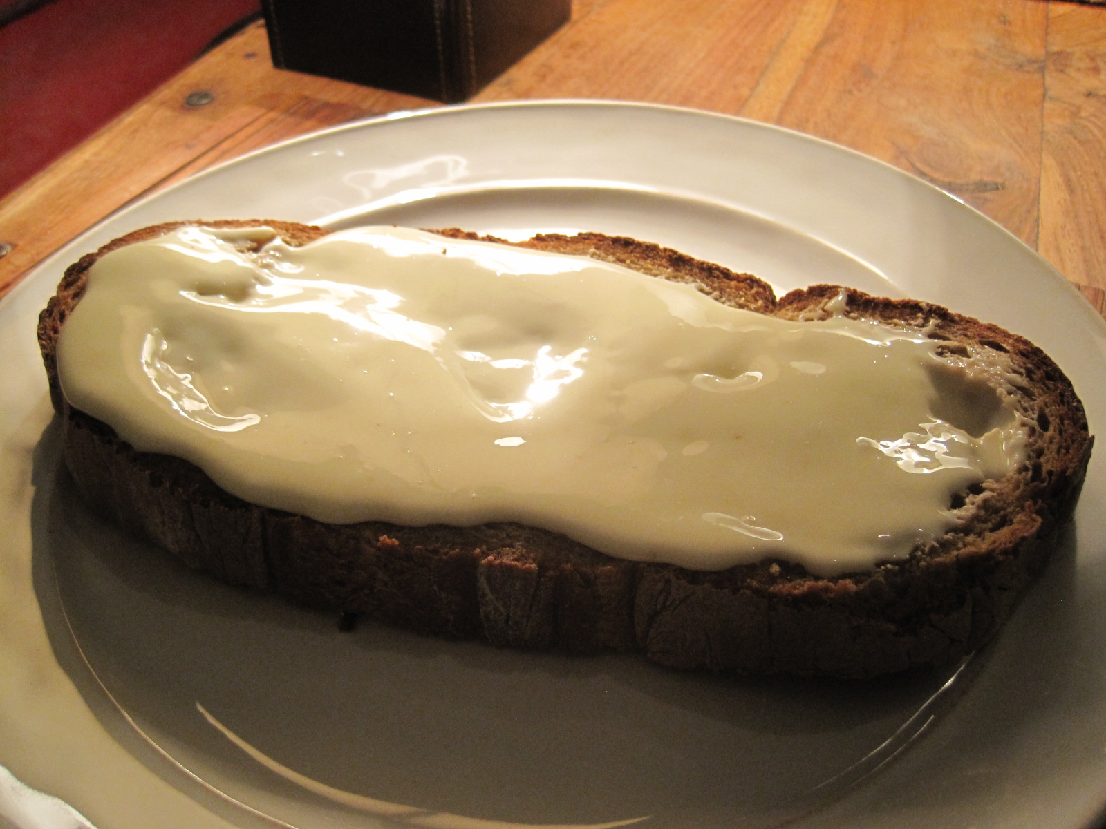 Tartine cancoillote